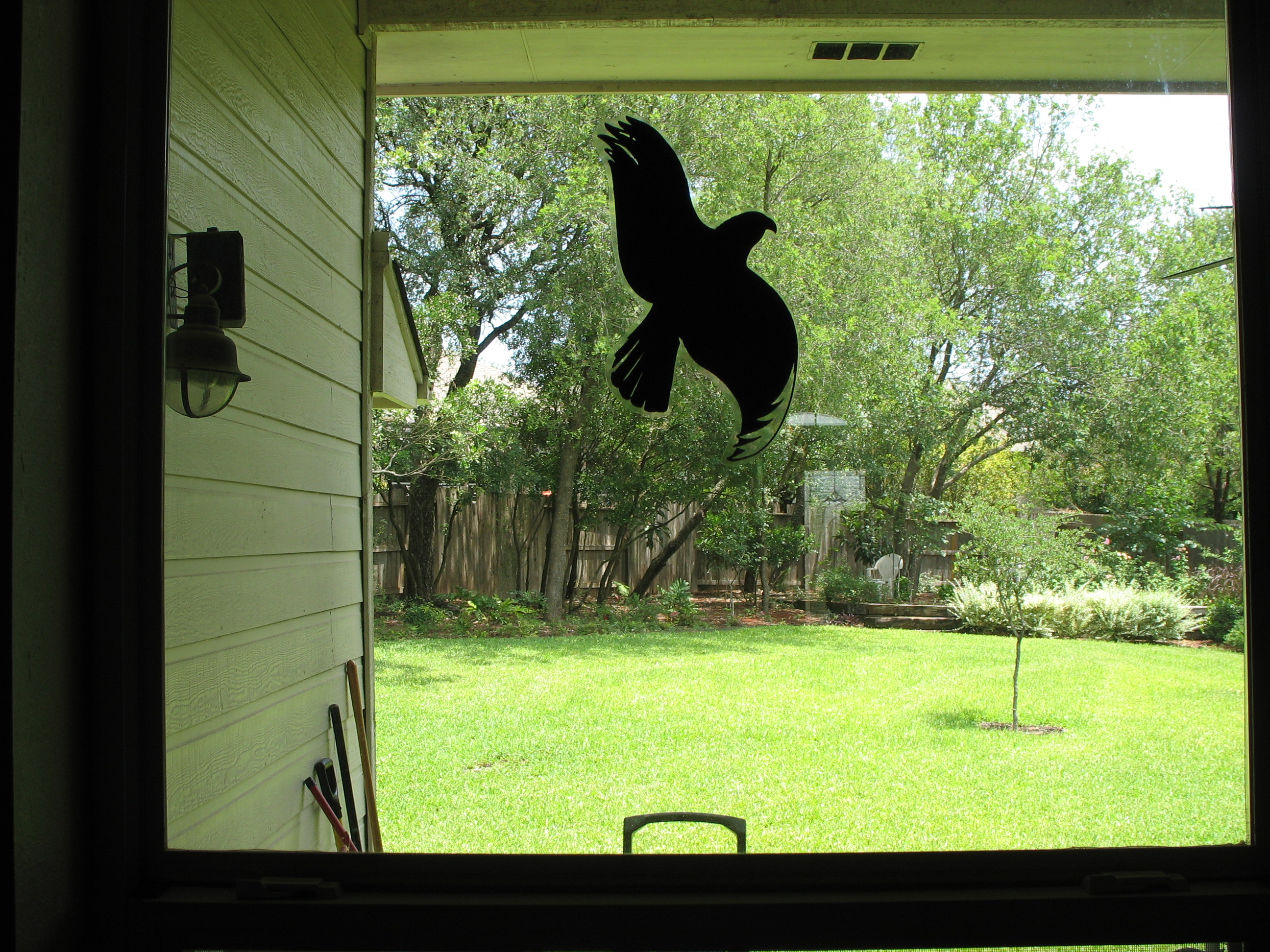 Warnvogel an einer Fensterscheibe eines Wohnhauses in Texas